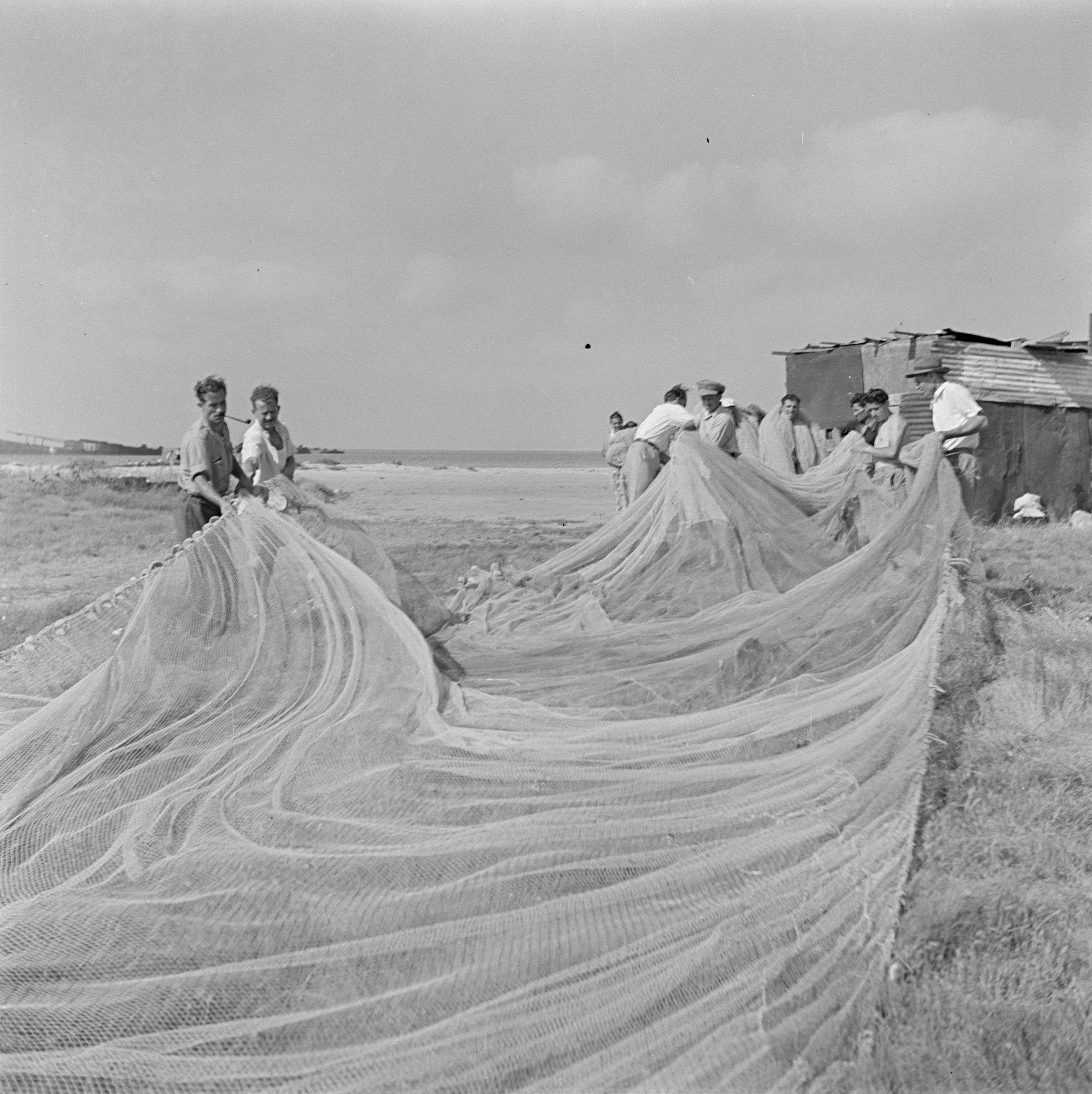 Collectie / Archief : Fotocollectie Van de Poll Reportage / Serie : Israel 1948-1949:Haifa Beschrijving : Nieuw aangekomen immigranten (oliem) worden omgeschoold tot vissers. Vissers aan de baai van Haifa bezig met netten Datum : 1948 Locatie : Haifa, Israël Trefwoorden : immigranten, omscholing, visnetten, visserij, vissers Fotograaf : Poll, Willem van de, [onbekend] Auteursrechthebbende : Nationaal Archief Materiaalsoort : Negatief (zwart/wit) Nummer archiefinventaris : bekijk toegang 2.24.14.02 Bestanddeelnummer : 255-1574